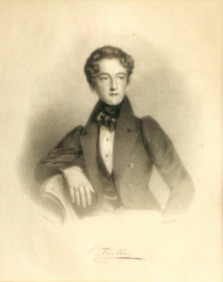 Lithographie de Sigismund Thalberg à l'age de 18 ans